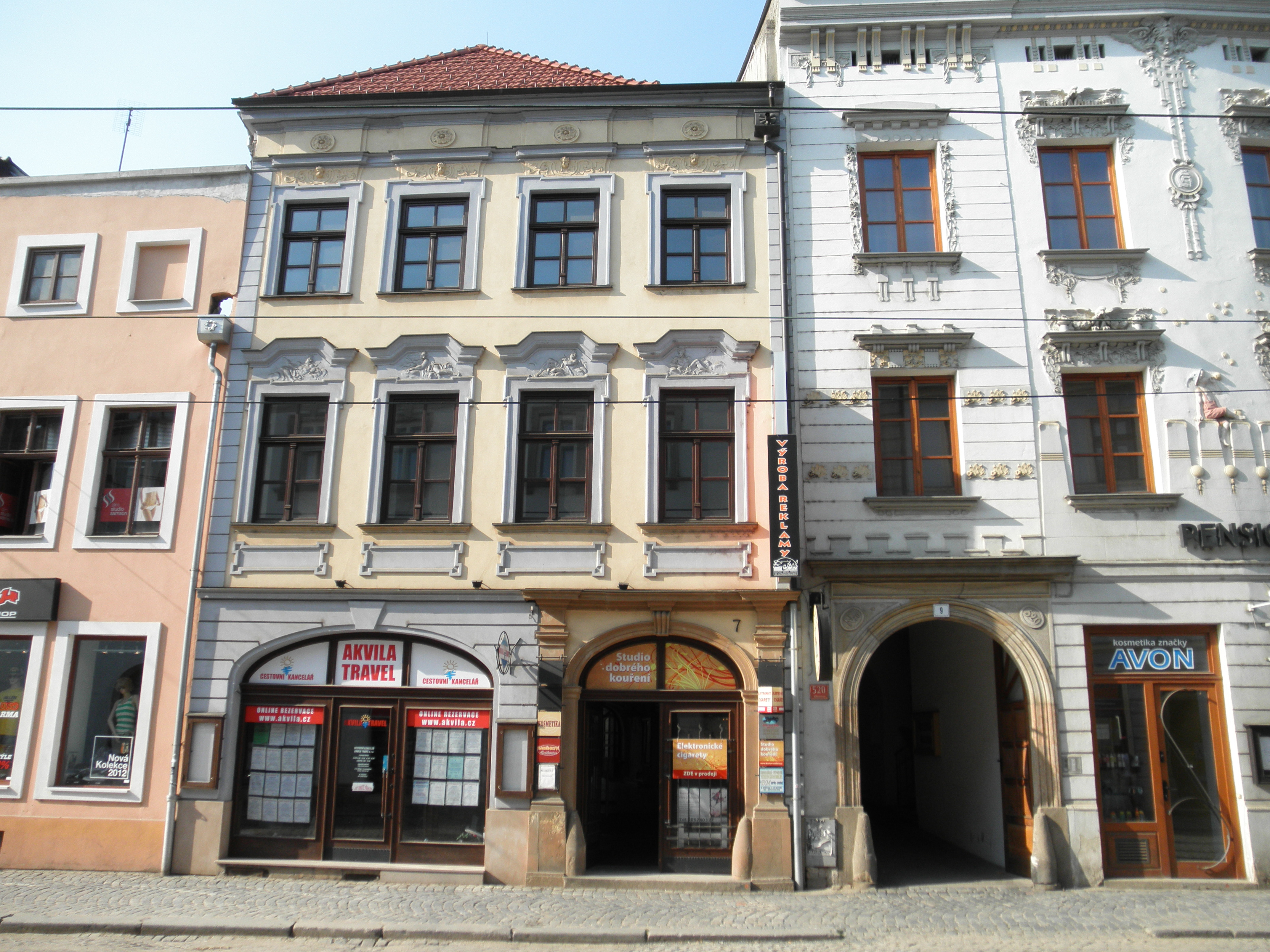 Měšťanský dům (Olomouc), 8. května 521/7, Olomouc